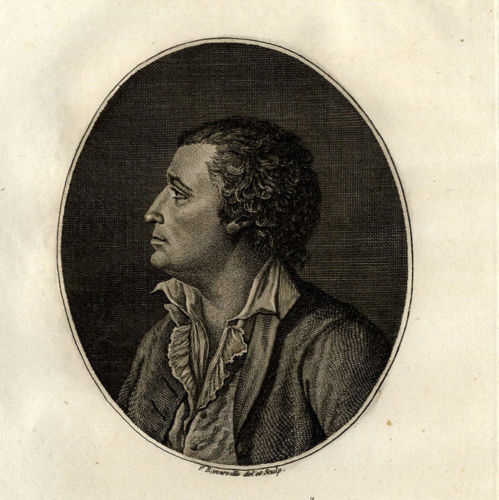 Edmond Louis Dubois-Crancé, gravure de François Bonneville, fin du XVIIIe siècle